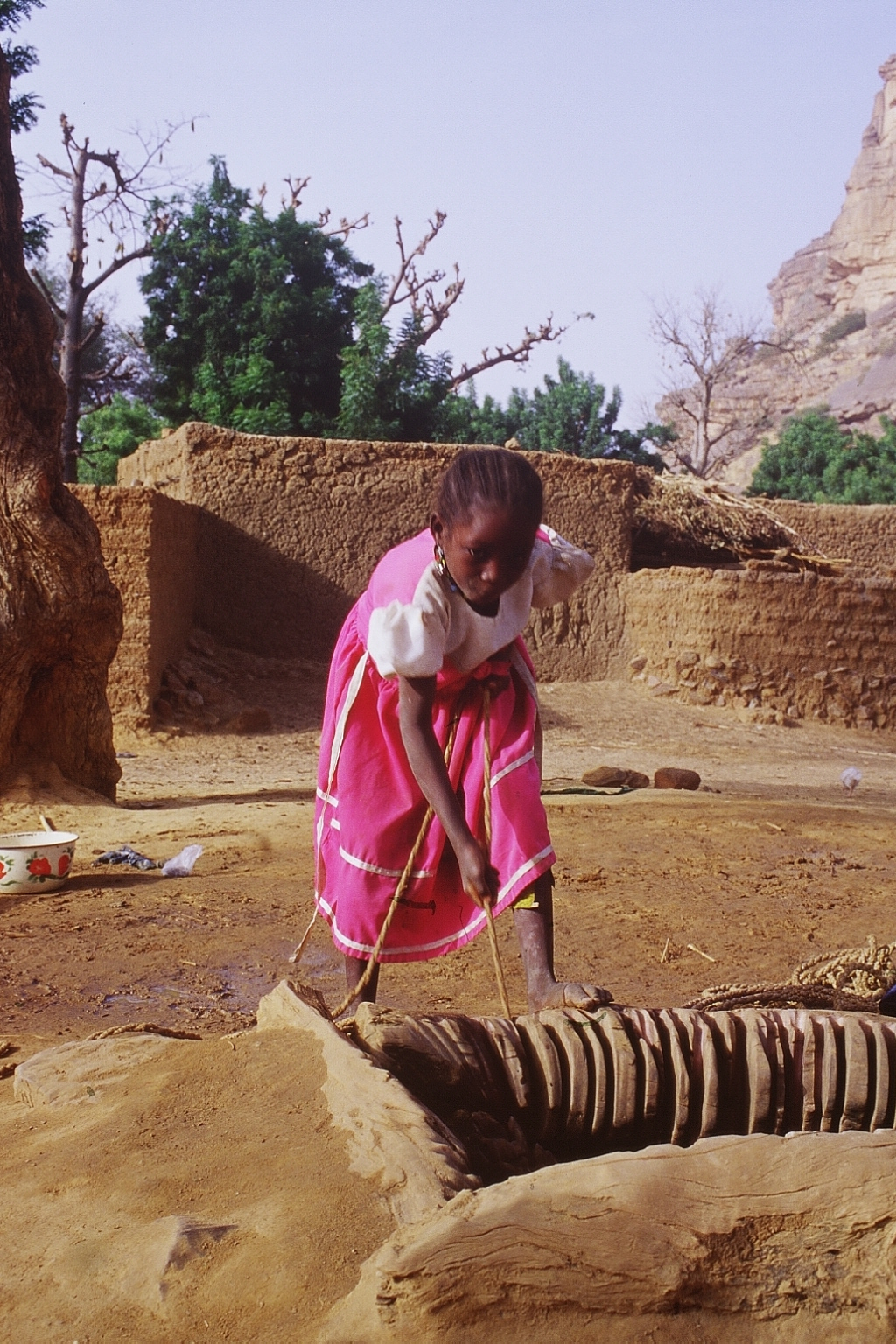 Jeune fille tirant de l'eau au puit, village de Kani Kombolé (pays dogon), régiond e Mopti, Mali